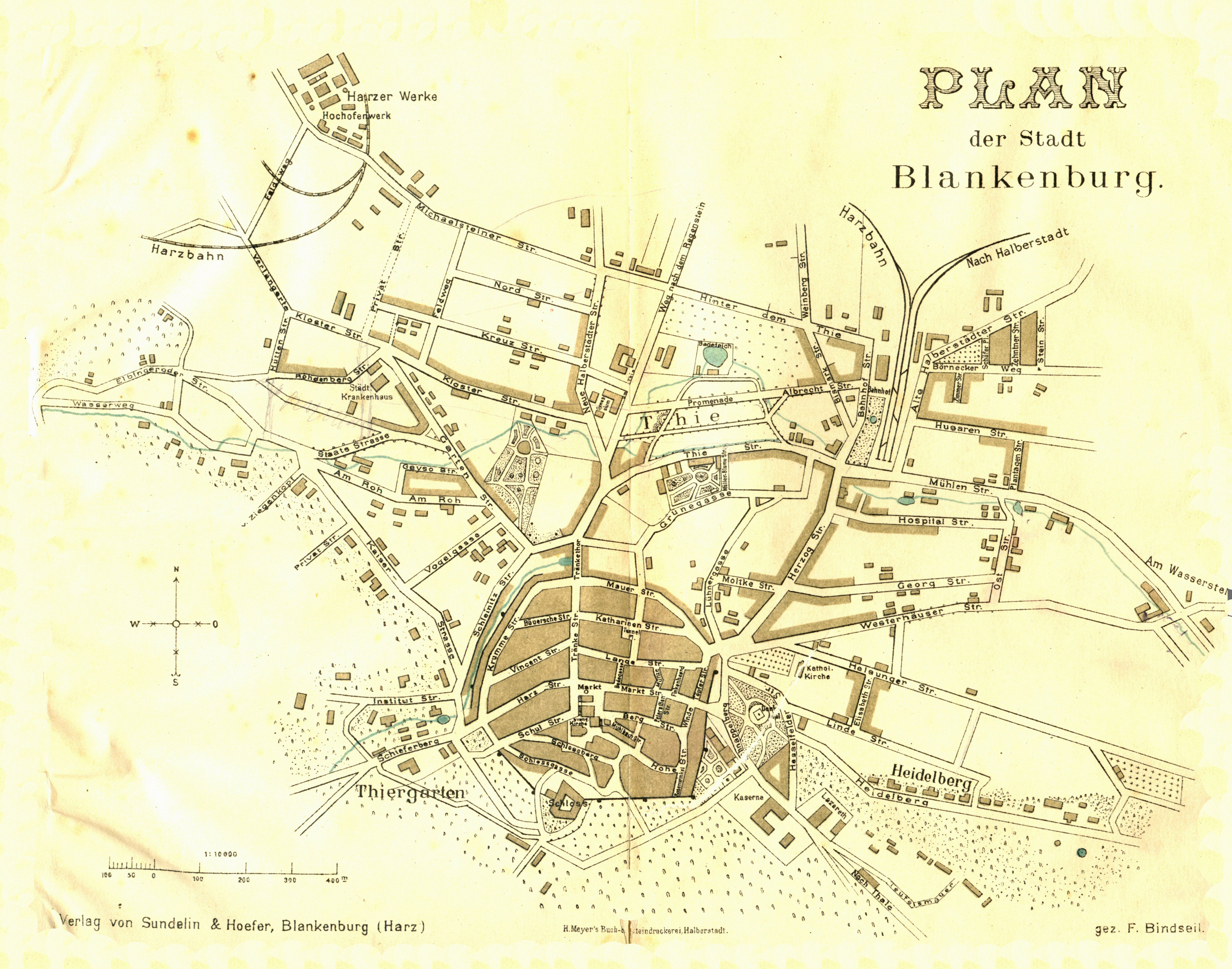 Plan der Stadt Blankenburg (Harz) von 1891